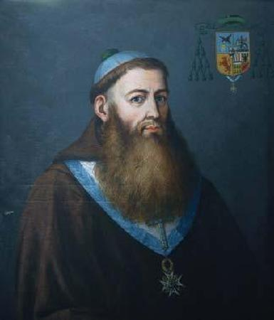 Retrato del obispo Rafael de Vélez, obispo de Ceuta (1817-1824)